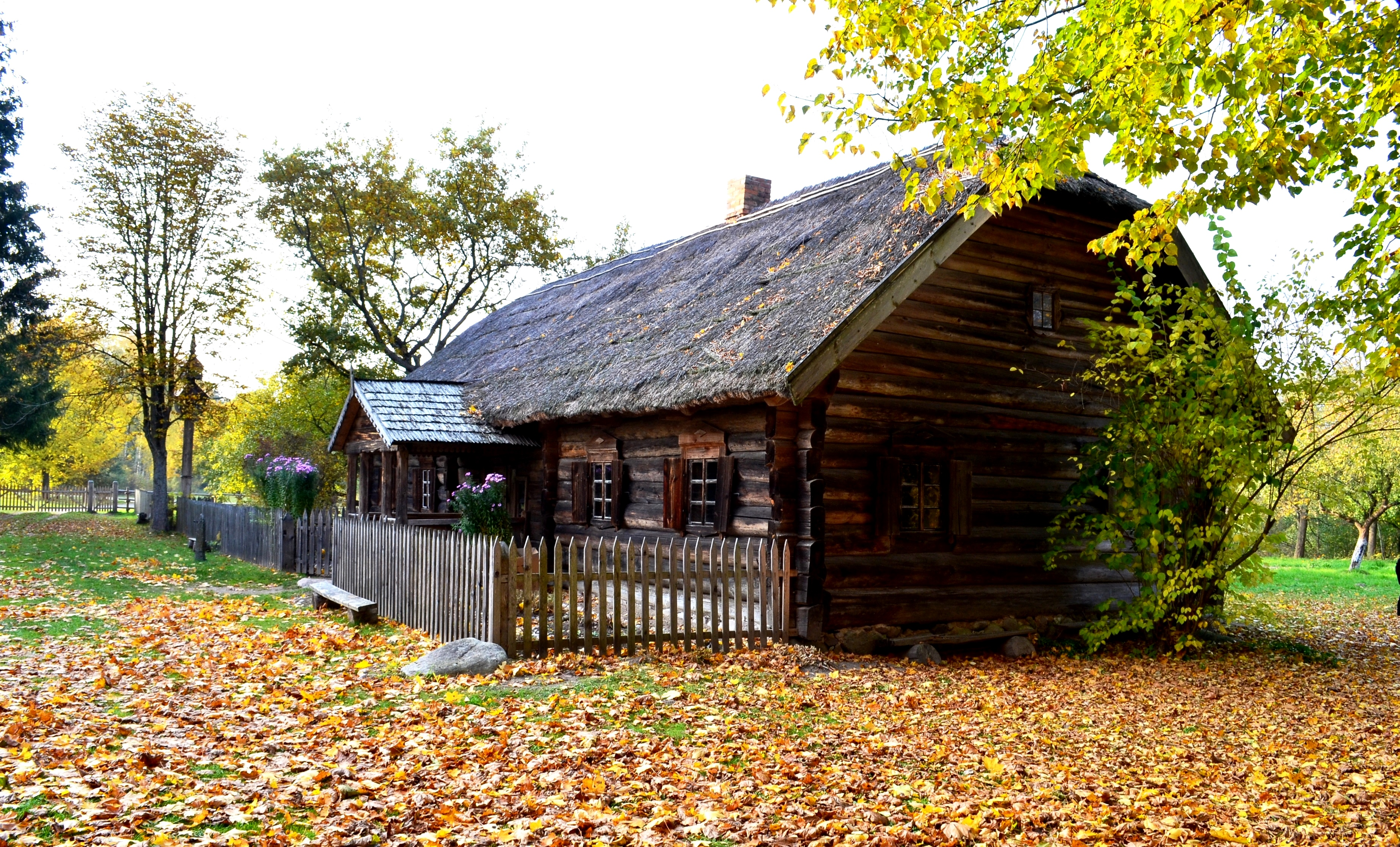 Aukštaičių gryčia iš Spalviškių, Rumšiškių muziejus